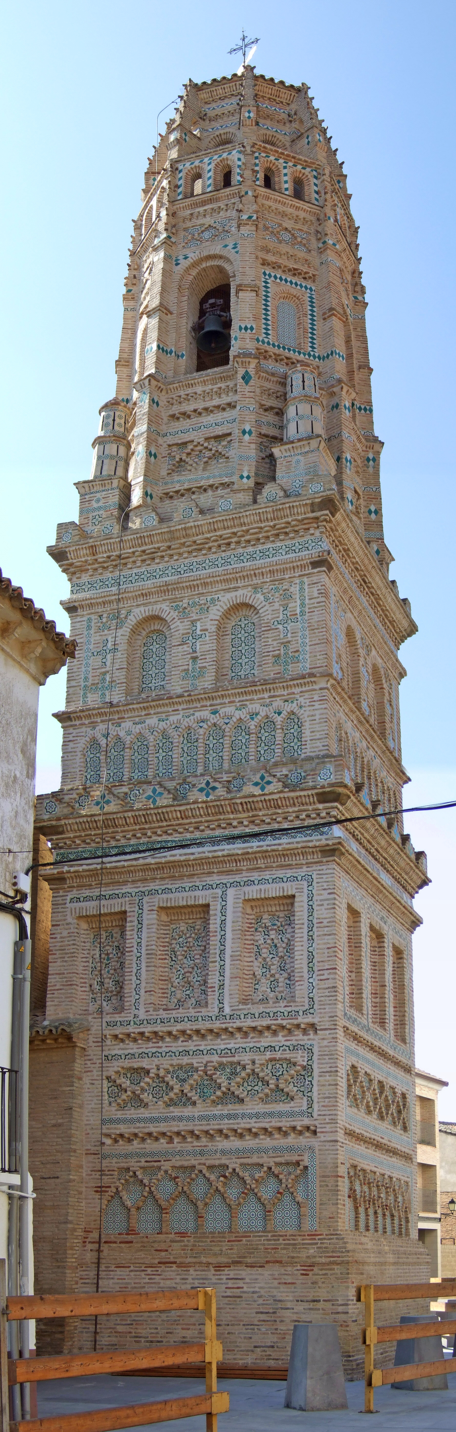 Torre de la iglesia de Utebo (Zaragoza)